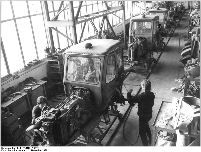 Röbel, Reperaturstrasse des KfL ADN-ZB Bartocha 12.12.79 Bez. Neubrandenburg: Im Kreisbetrieb für Landtechnik (KfL) Röbel werden sämtliche Traktoren vom Typ MTS 50-52 aus den Landwirtschaftsbetrieben der drei Nordbezirke sowie der nördlichen Kreise des Bezirks Potsdam und aus Berlin überholt. Die Reparaturschlosser in der spezialisierten Instandhaltung liefern jede reparierte Maschine mit einem Qualitätspaß aus. Ziel ist, 70 Traktoren zusätzlich zu überholen.